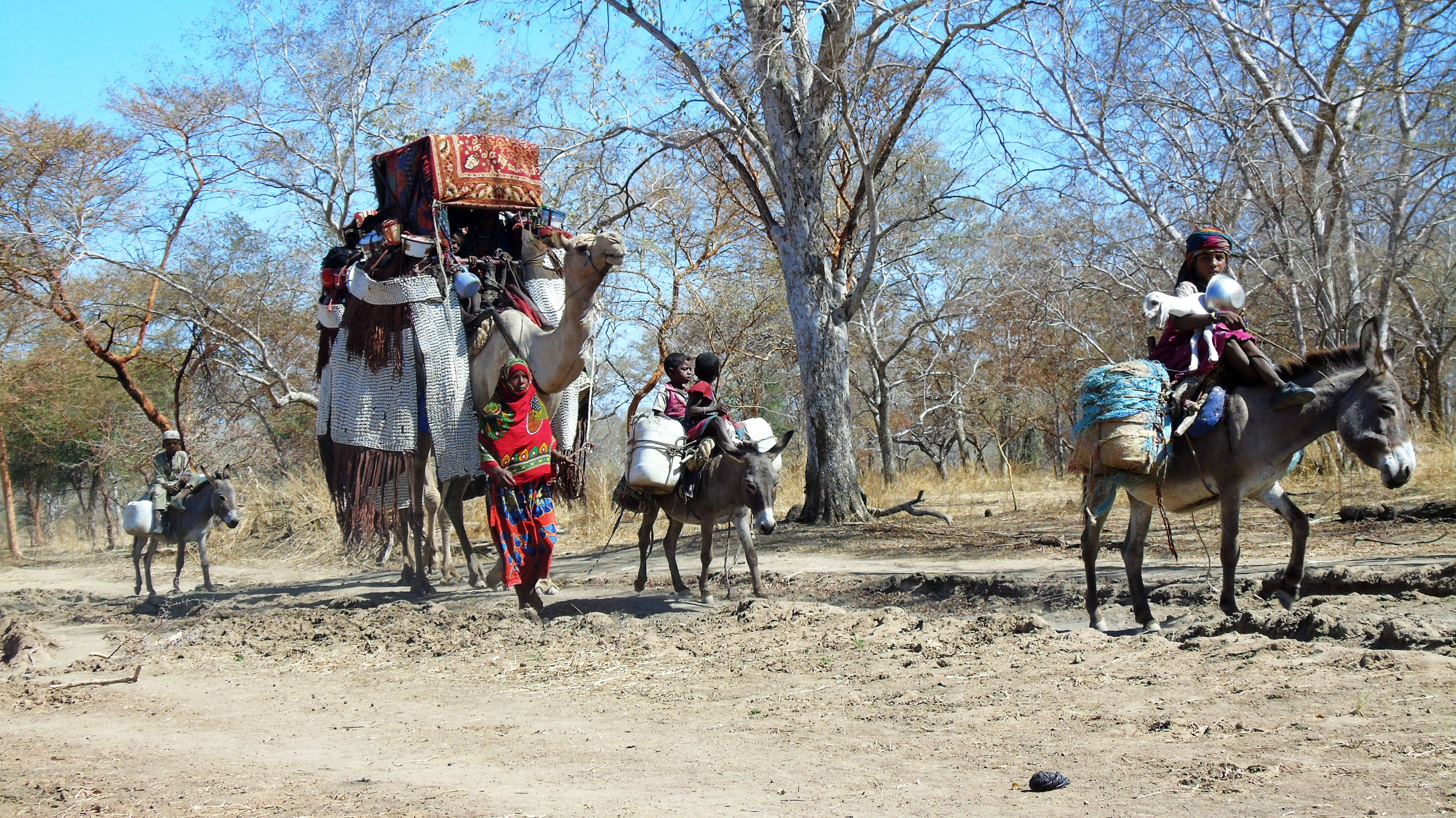 C'est une caravane des nomades sur une route du Tchad entre Mangalé et Zakouma This is an image with the theme "Africa on the Move or Transport" from: Chad